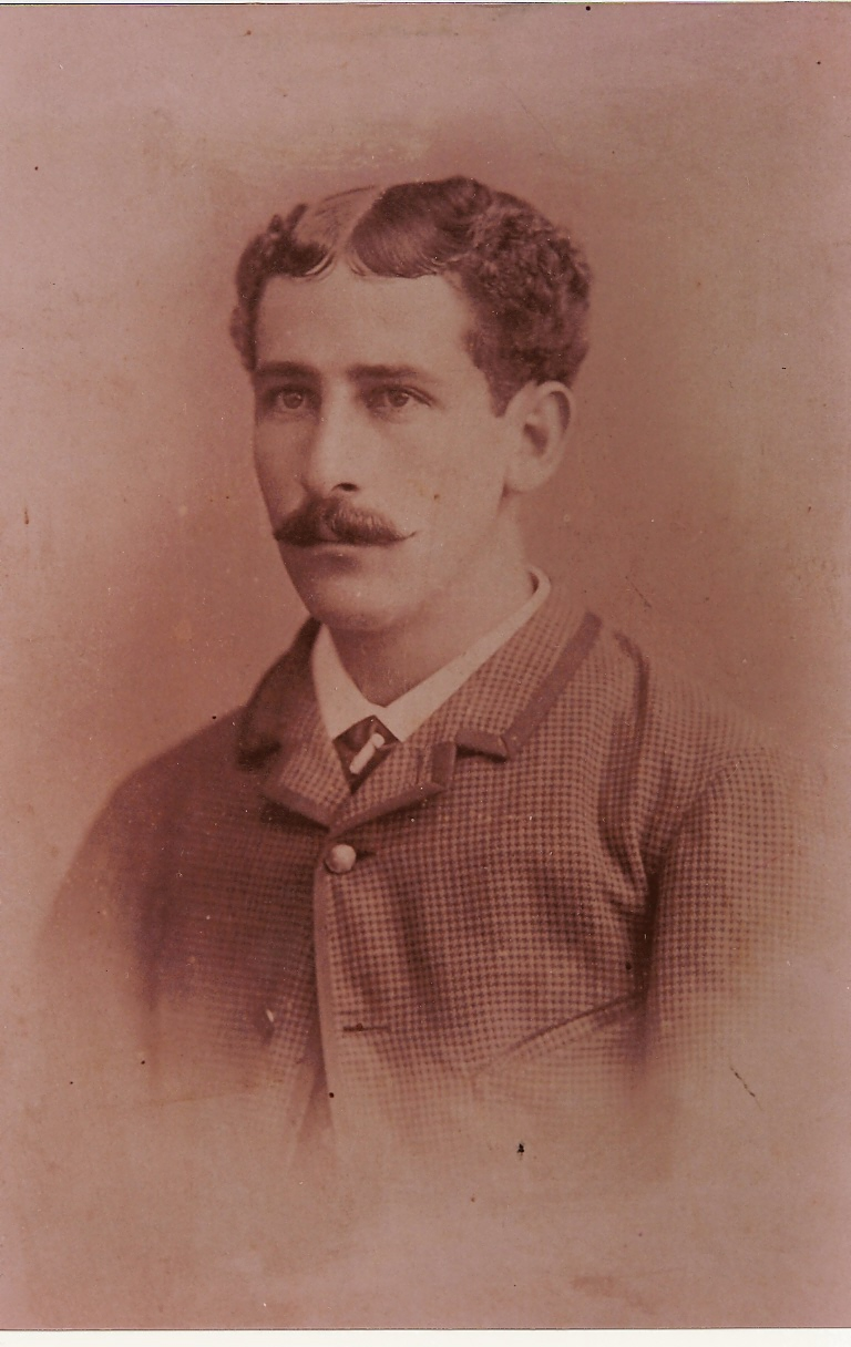 imagen de don MANUEL EGIDIO BALLESTEROS RIOS